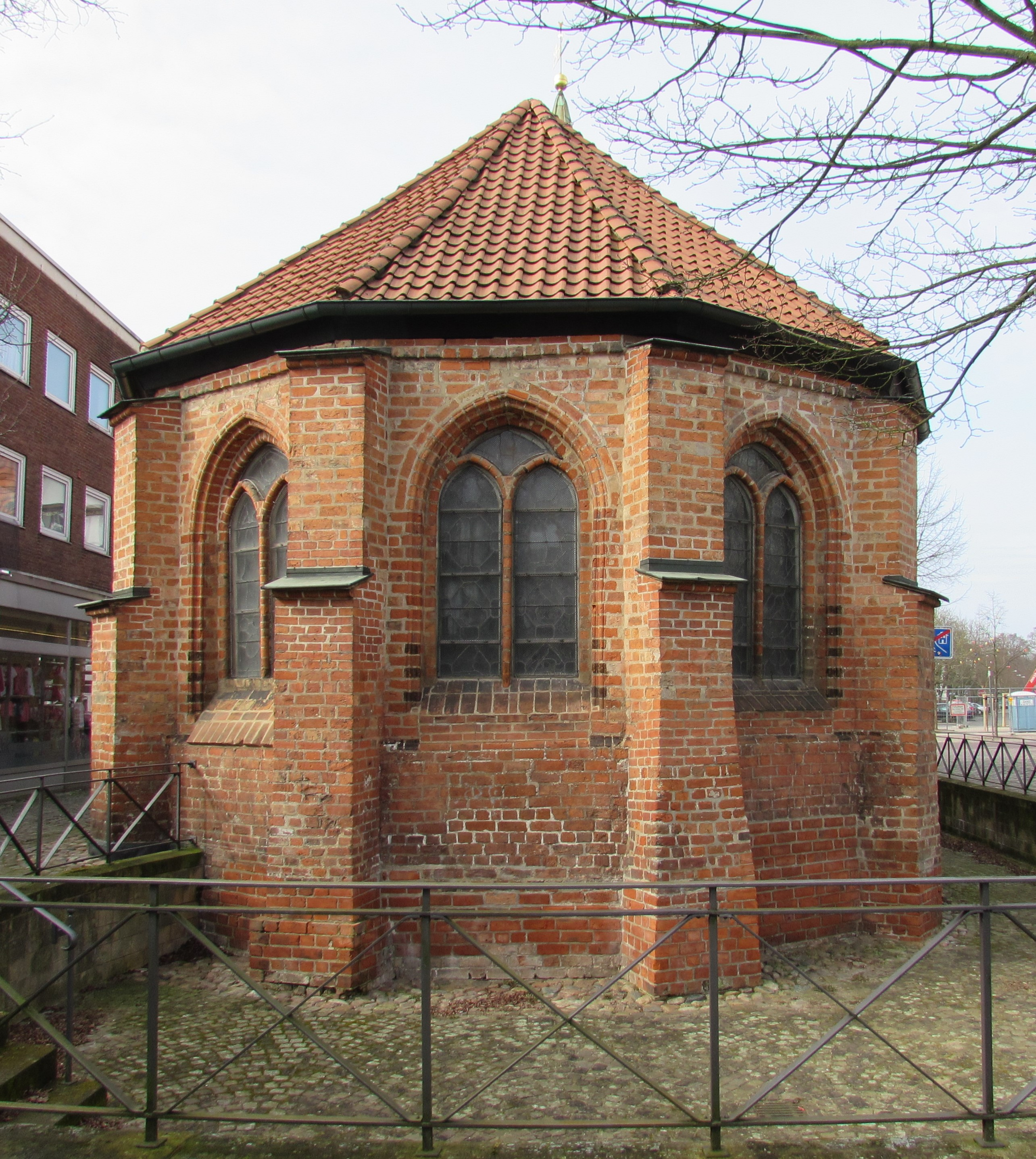 Die Rückseite der Heiligen-Geist-Kapelle in Uelzen.